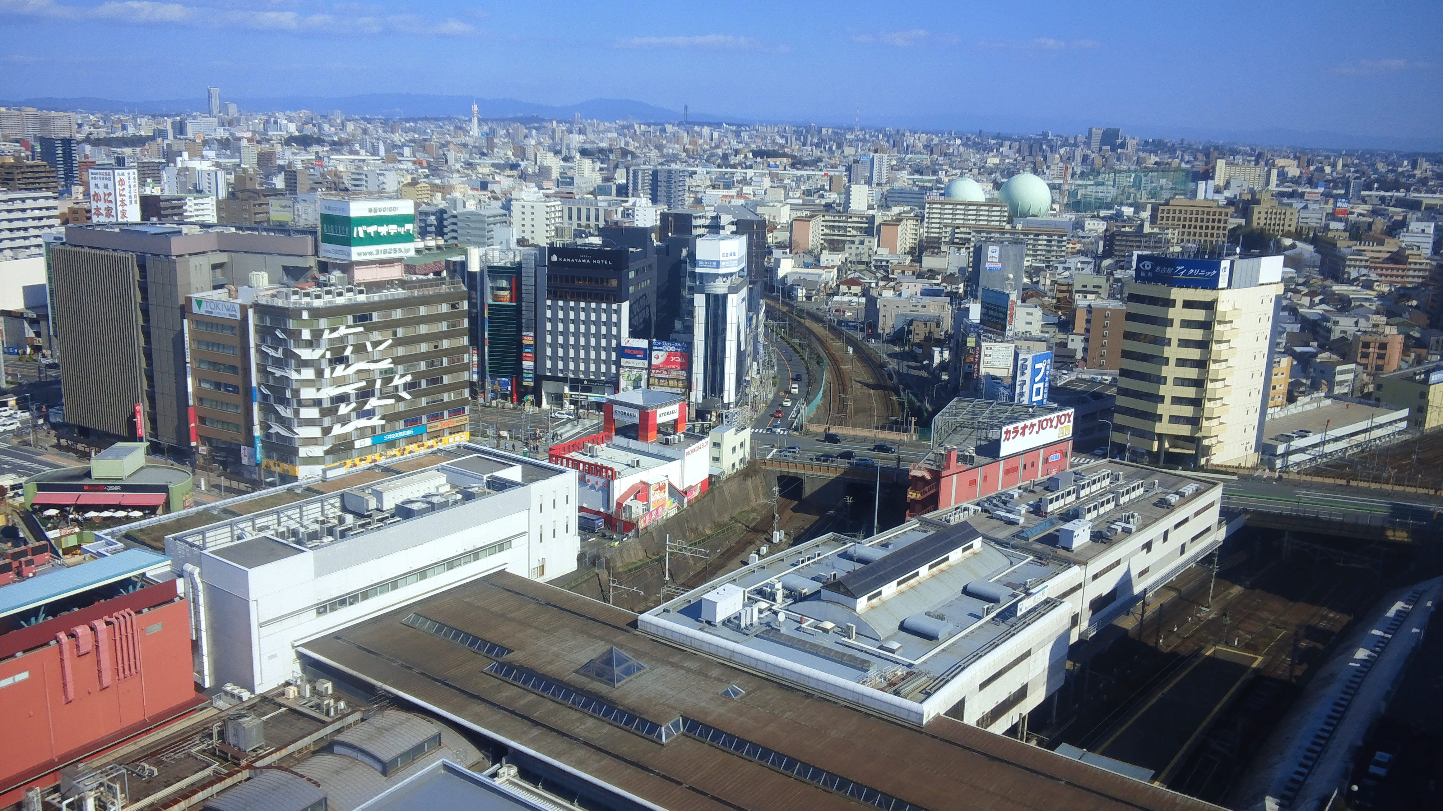 金山駅を見る